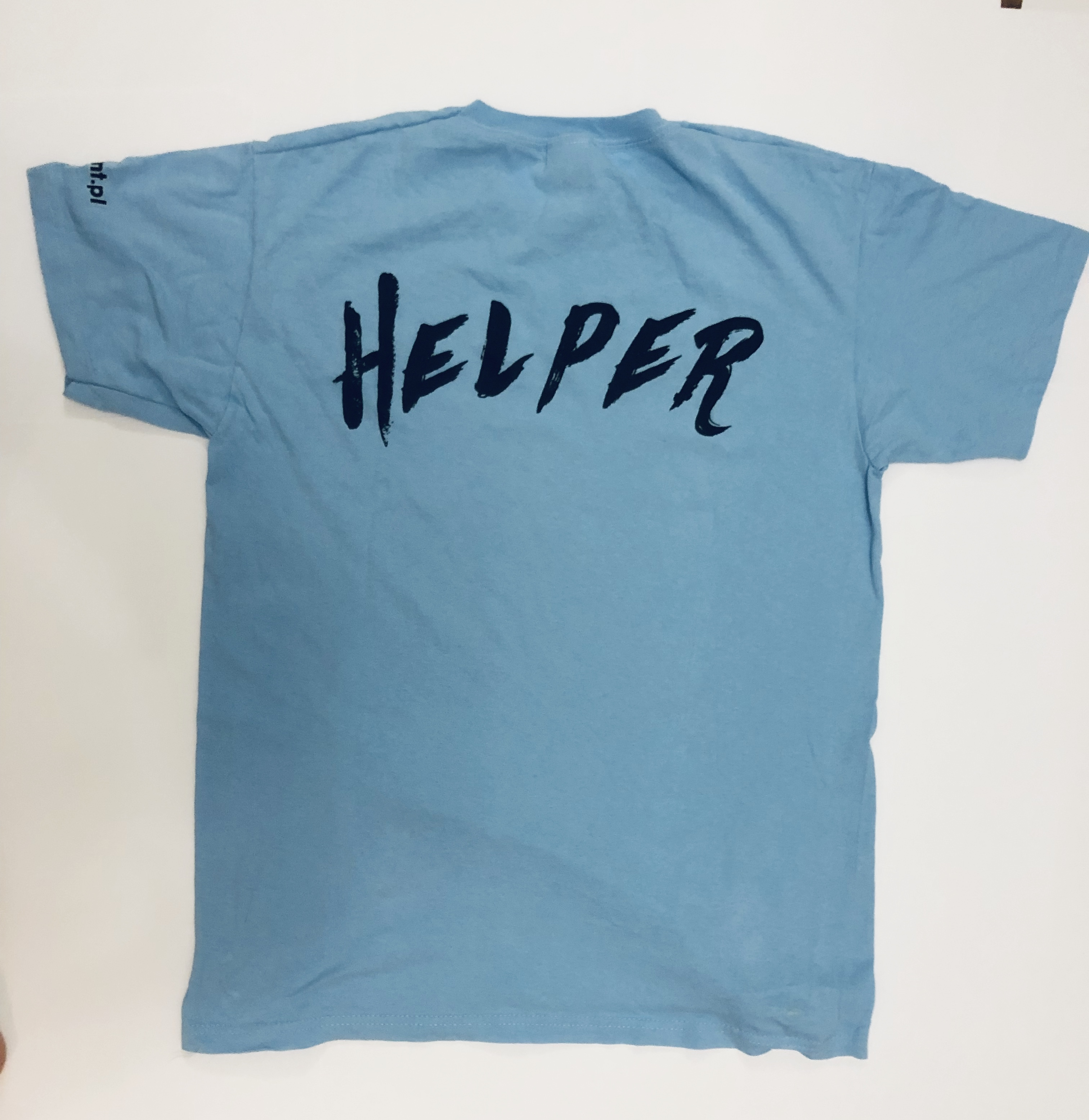 Tył koszulki HELPER Sabat Fiction-Fest